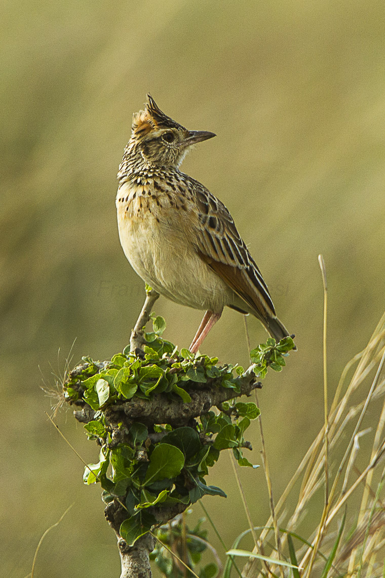 Rufous-naped lark in Kenya, likely in Maasai Mara